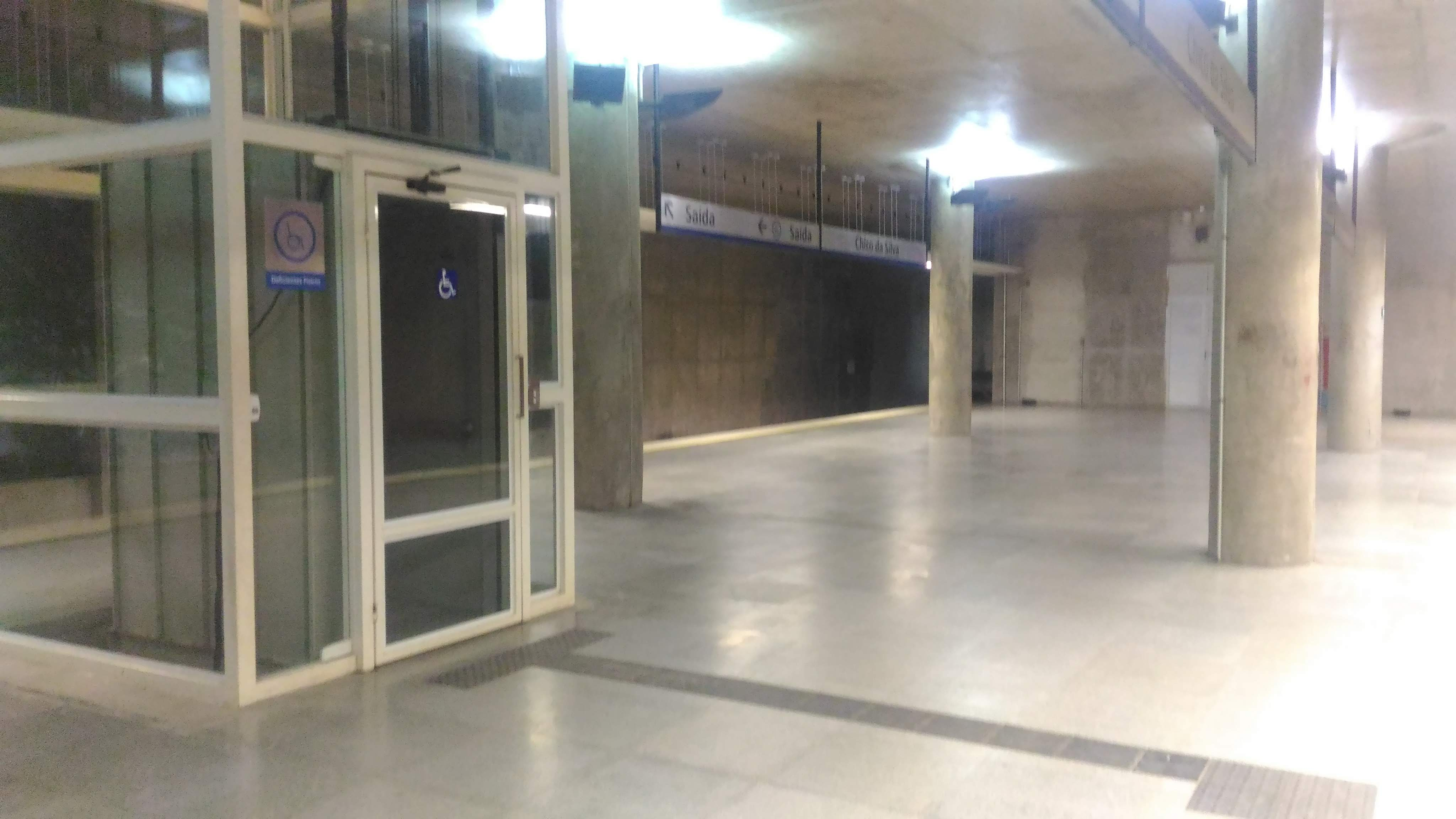 Estação Central do metrô de Fortaleza, Chico da Silva.